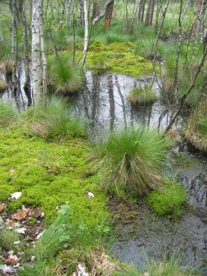 Torfmoos-Teppich im "Prackendorfer und Kulzer Moos".